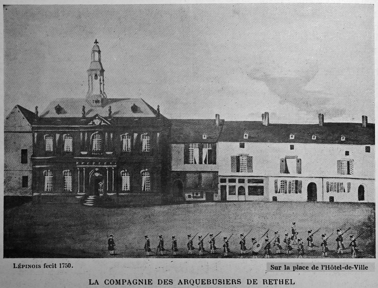 publié dans le "Bulletin de l'œuvre des voyages scolaires".